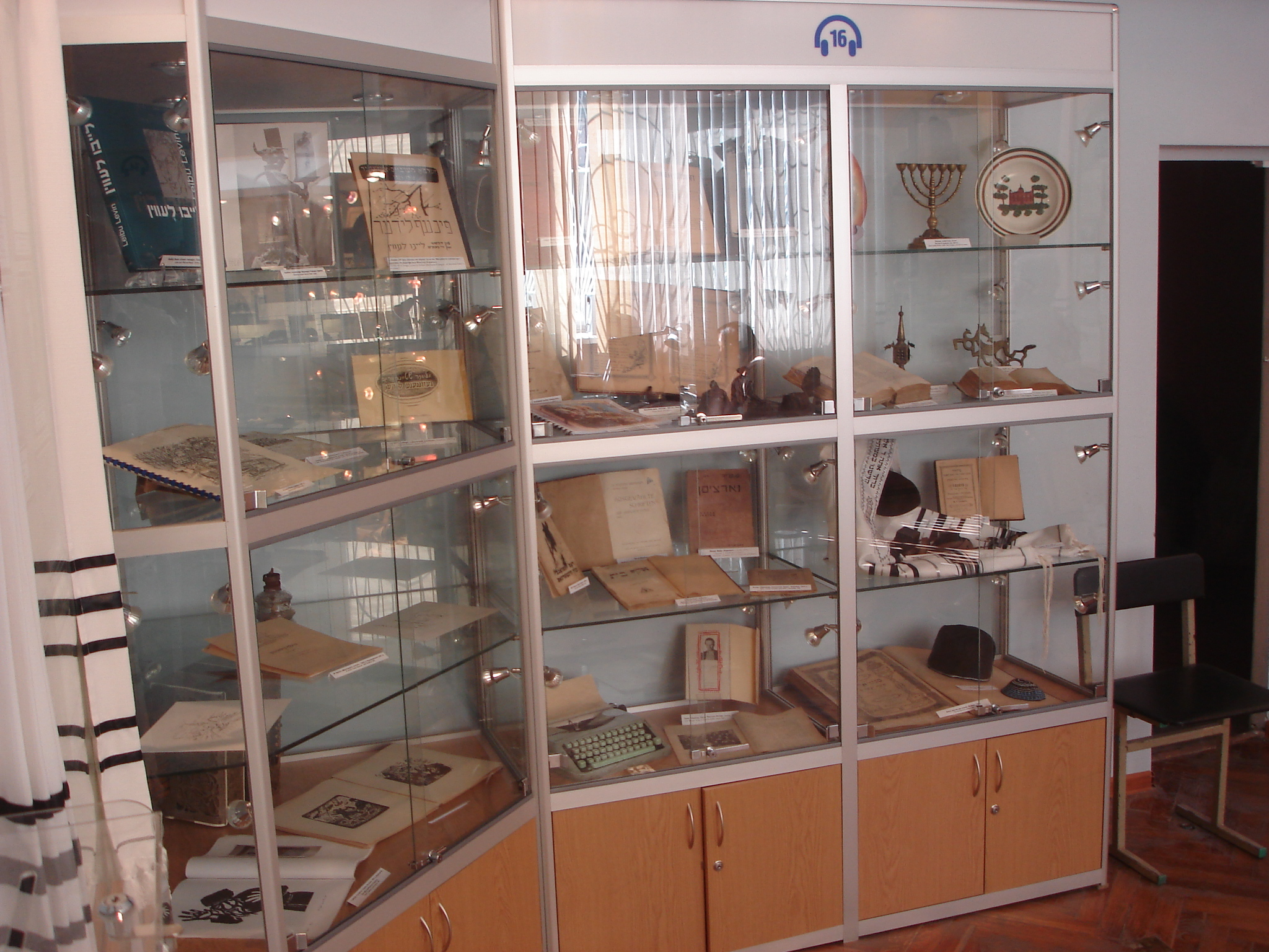 фрагмент експозиції музею